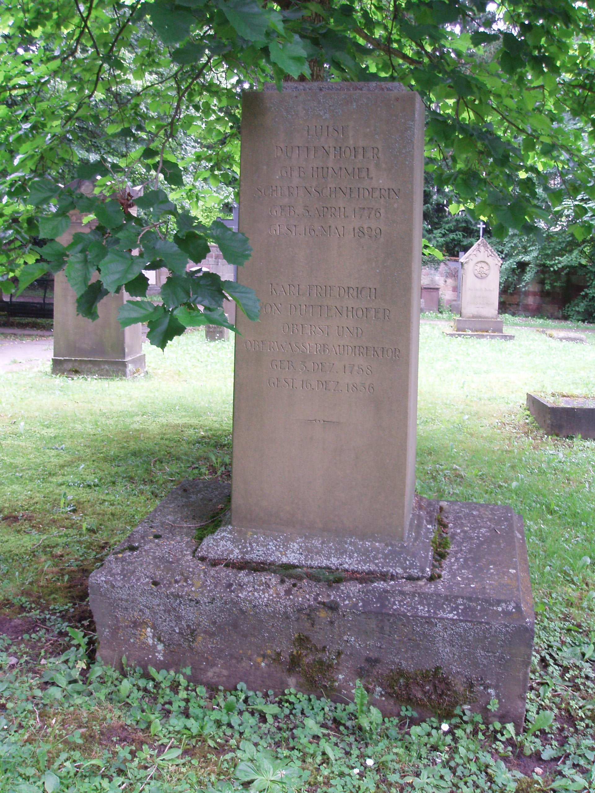 Das Grab der Familie Duttenhofer auf dem in Stuttgart-Mitte gelegenen Hoppenlaufriedhof